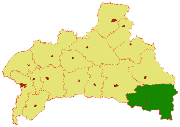 Stolin raion in Belarus